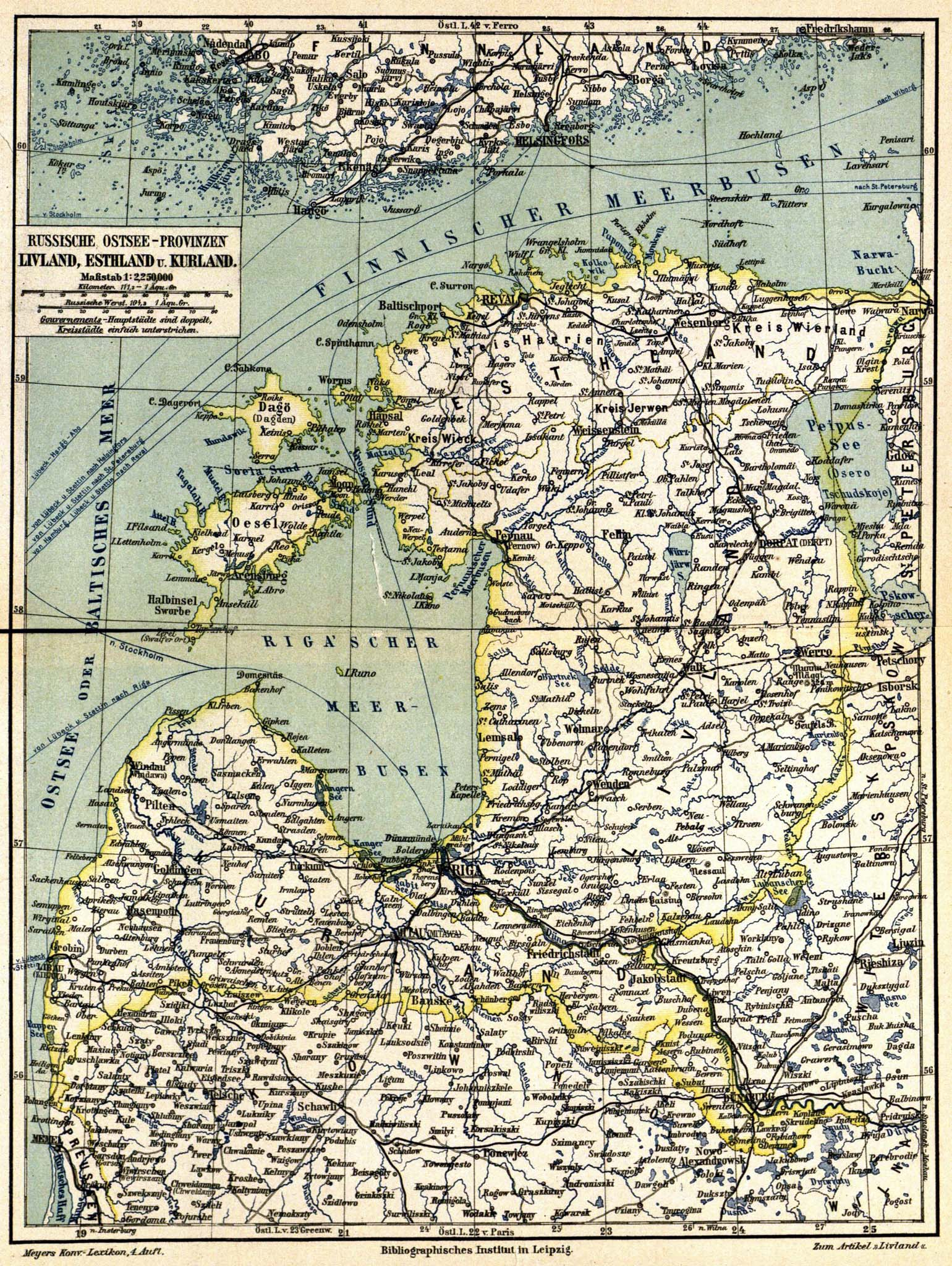 Karte „Russische Ostsee-Provinzen Livland, Esthland u. Kurland“ (1 : 2,250,000) zum Artikel „Livland“